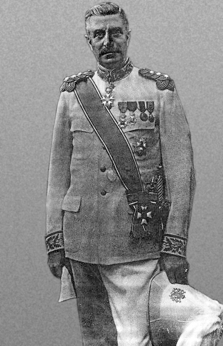 Portrait du comte Maurice Lippens, ministre d'Etat et gouverneur général du Congo belge